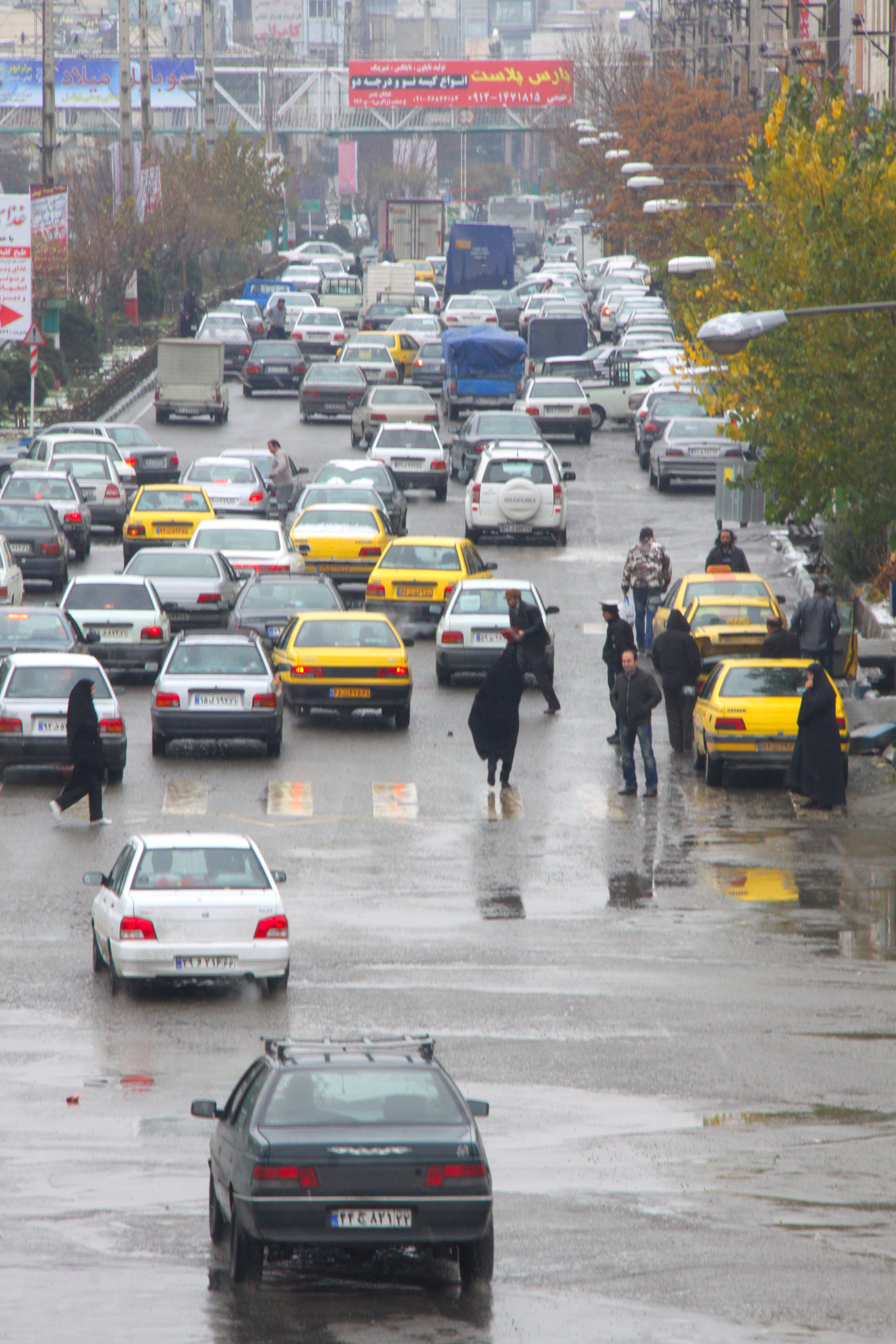 Ghods City / Tehran / Iran / Photo by: Alireza Habibi